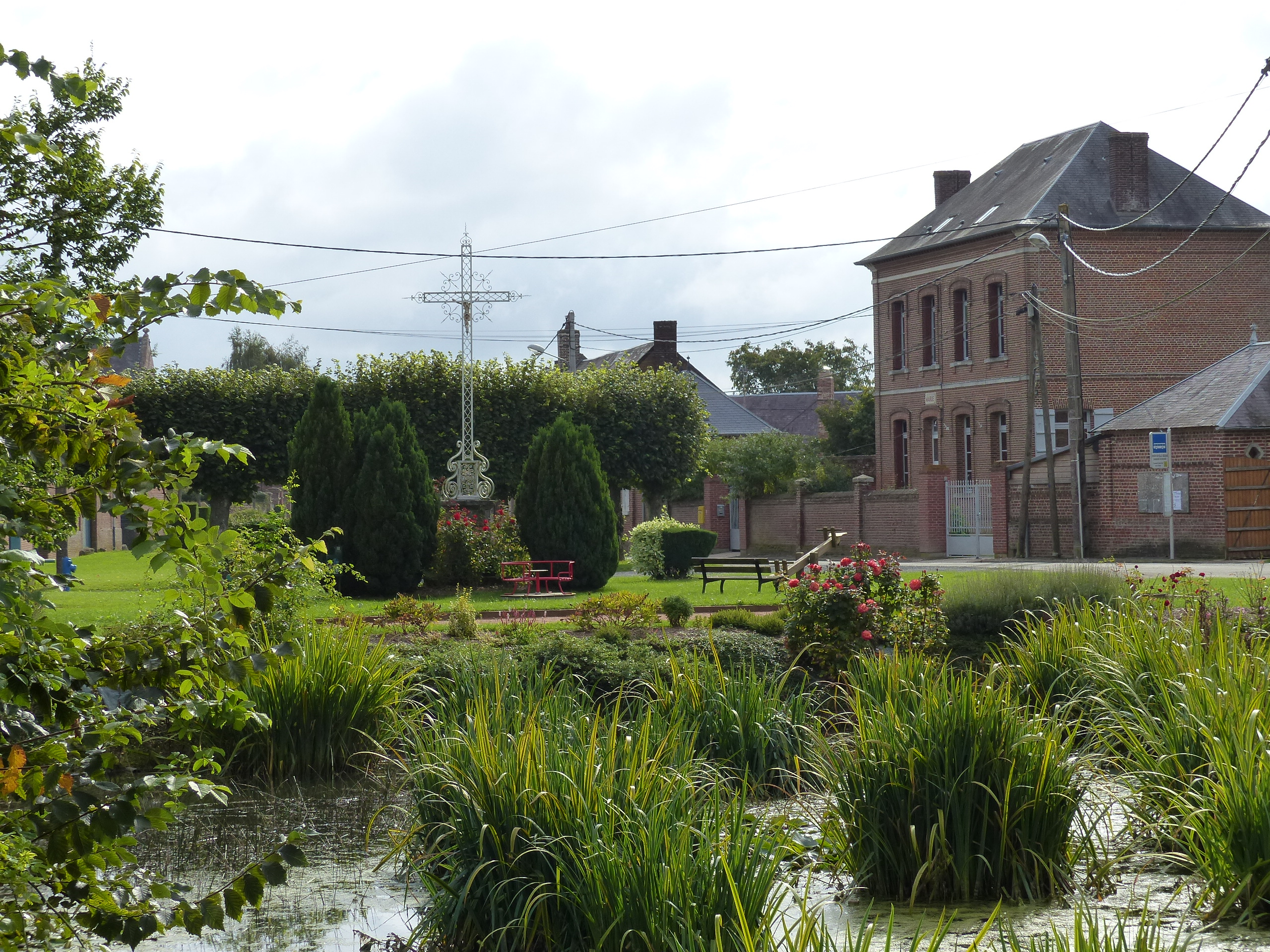 Mare de la place de l'Eglise et Mairie de Choqueuse-les-Bénard